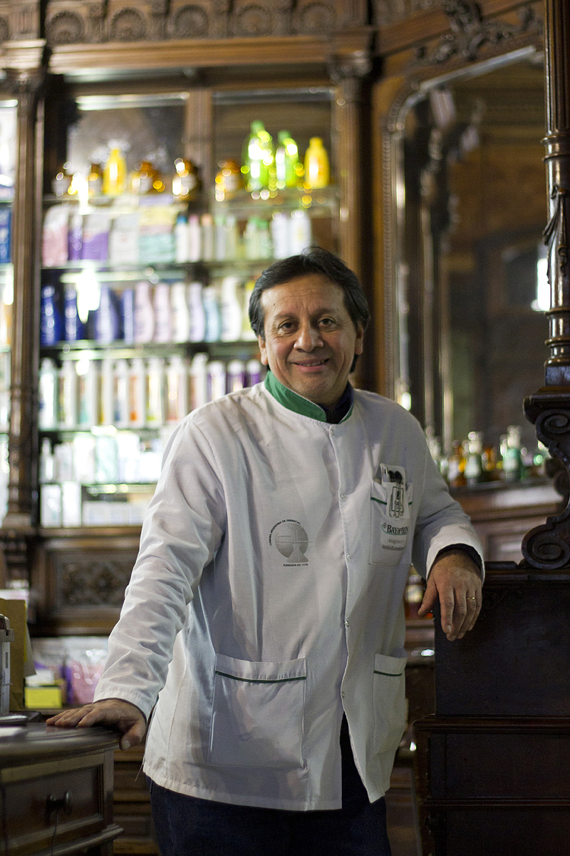 La Estrella y Alberto